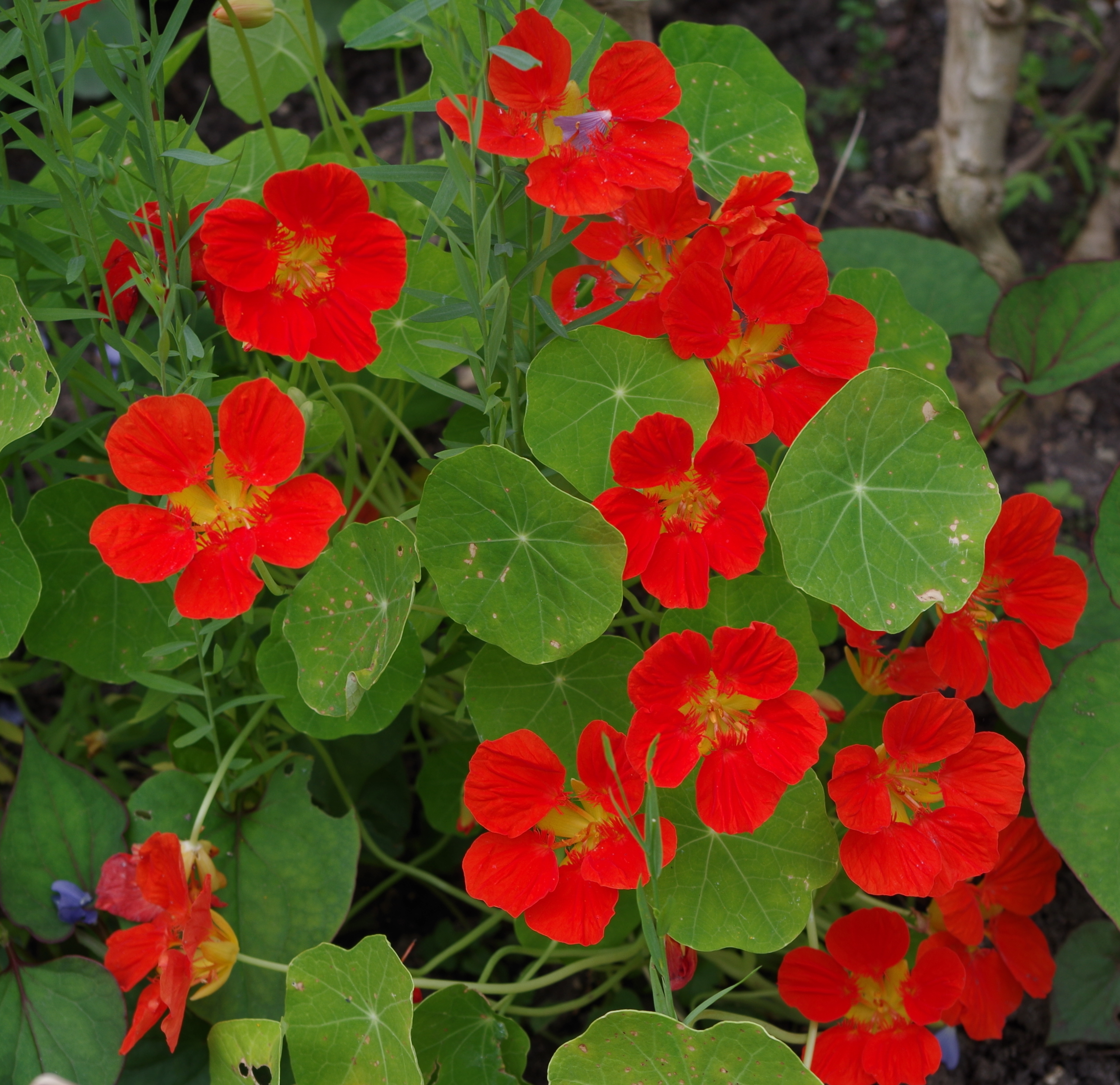 Capucines au Parc floral